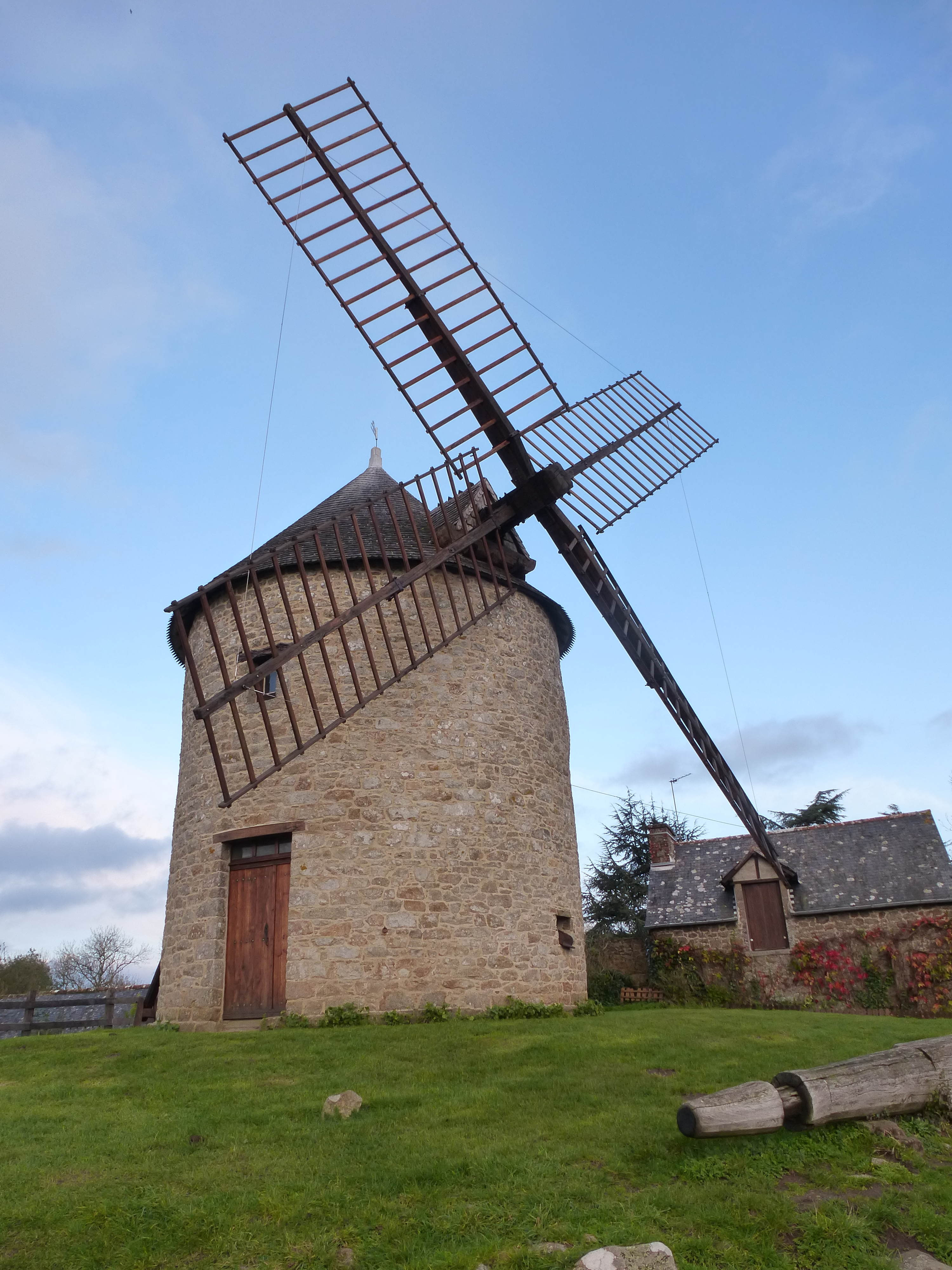 moulin au mont dol